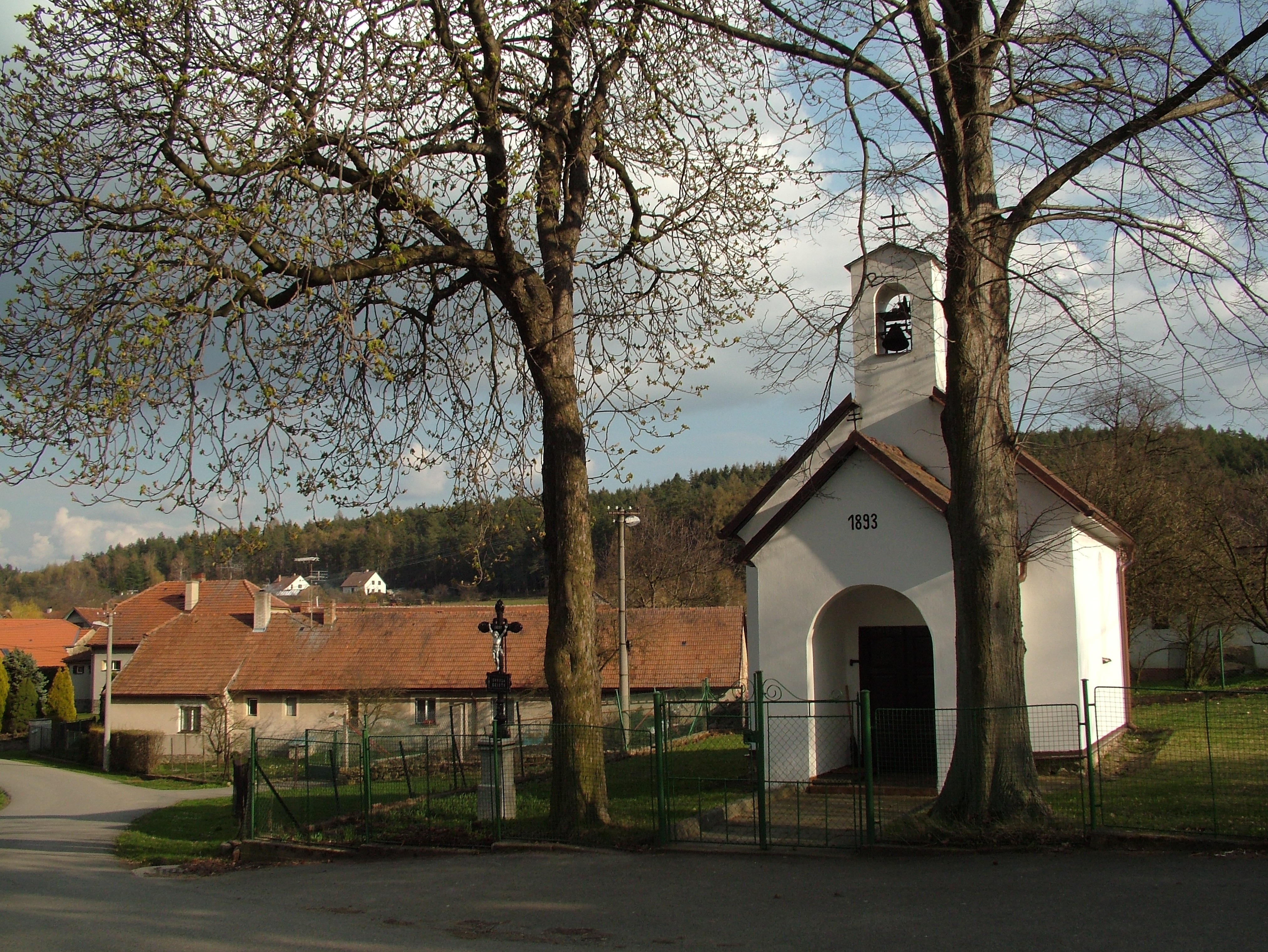 Autor fotografií: Vít Švajcr; Vít Švajcr´s photographs